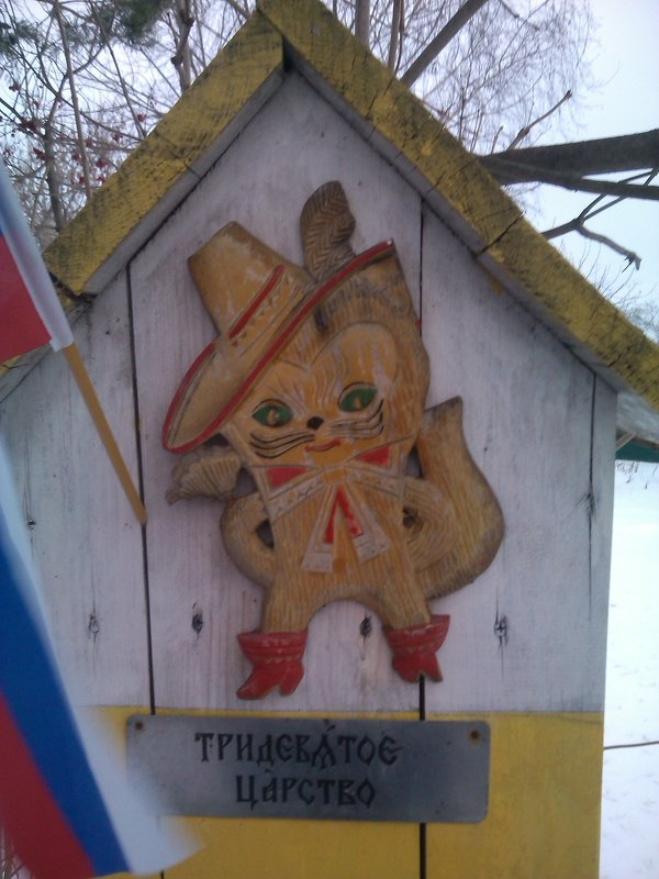 В музее игрушки в Пощупово